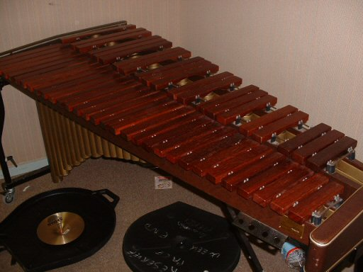 Un Marimba classique.